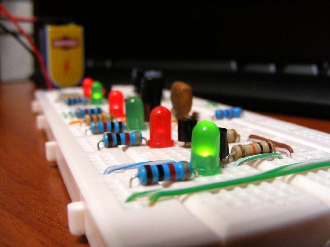 Se muestran tres circuitos electrónicos sobre una placa para prototipos (protoboard). Los circuitos son conocidos con el nombre de "multivibradores", a saber: estable, monoestable y biestable. Los construí en el 2008 para un laboratorio de la universidad.